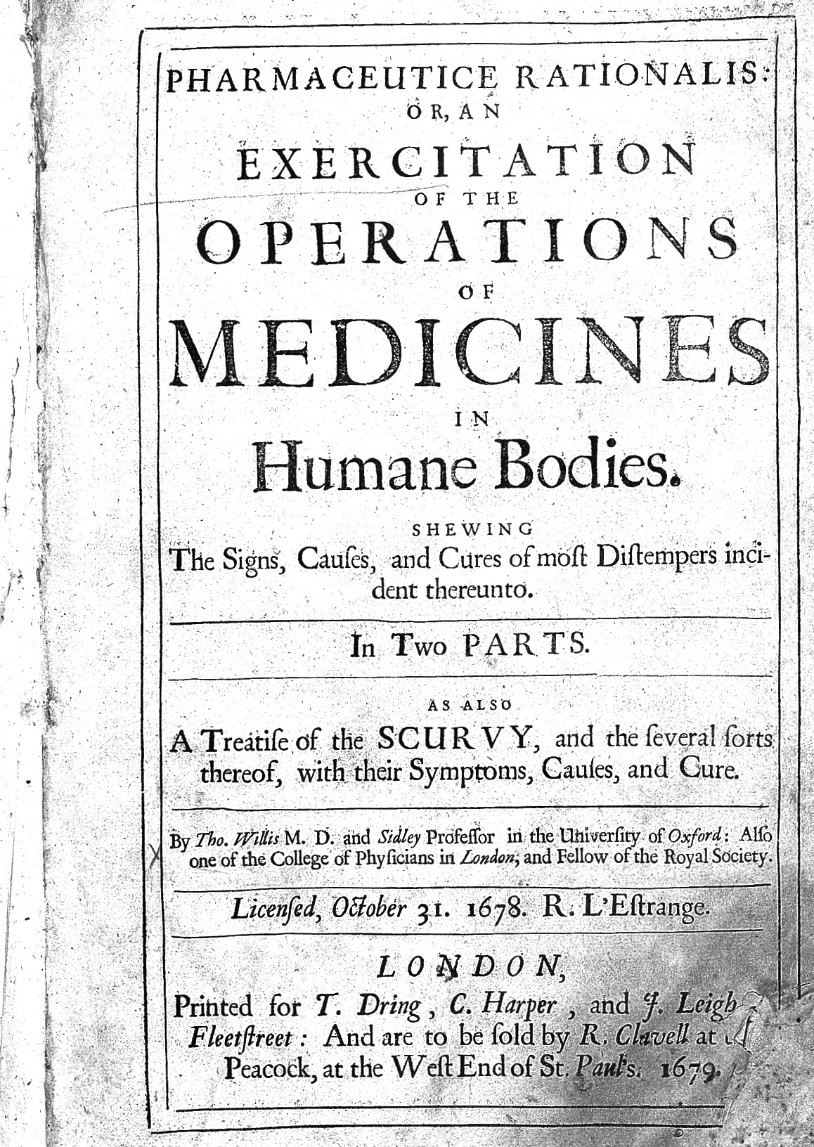 Rare Books